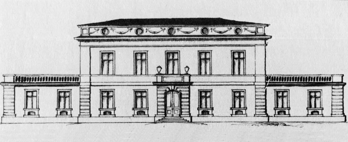 Fasadritning till Älvsjö huvudbyggnad i sengustaviansk stil enligt traditionen utförd av ägaren J.G. Lagerbielke